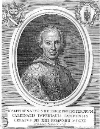 Cardinale Giuseppe Renato Imperiali (1651-1737)